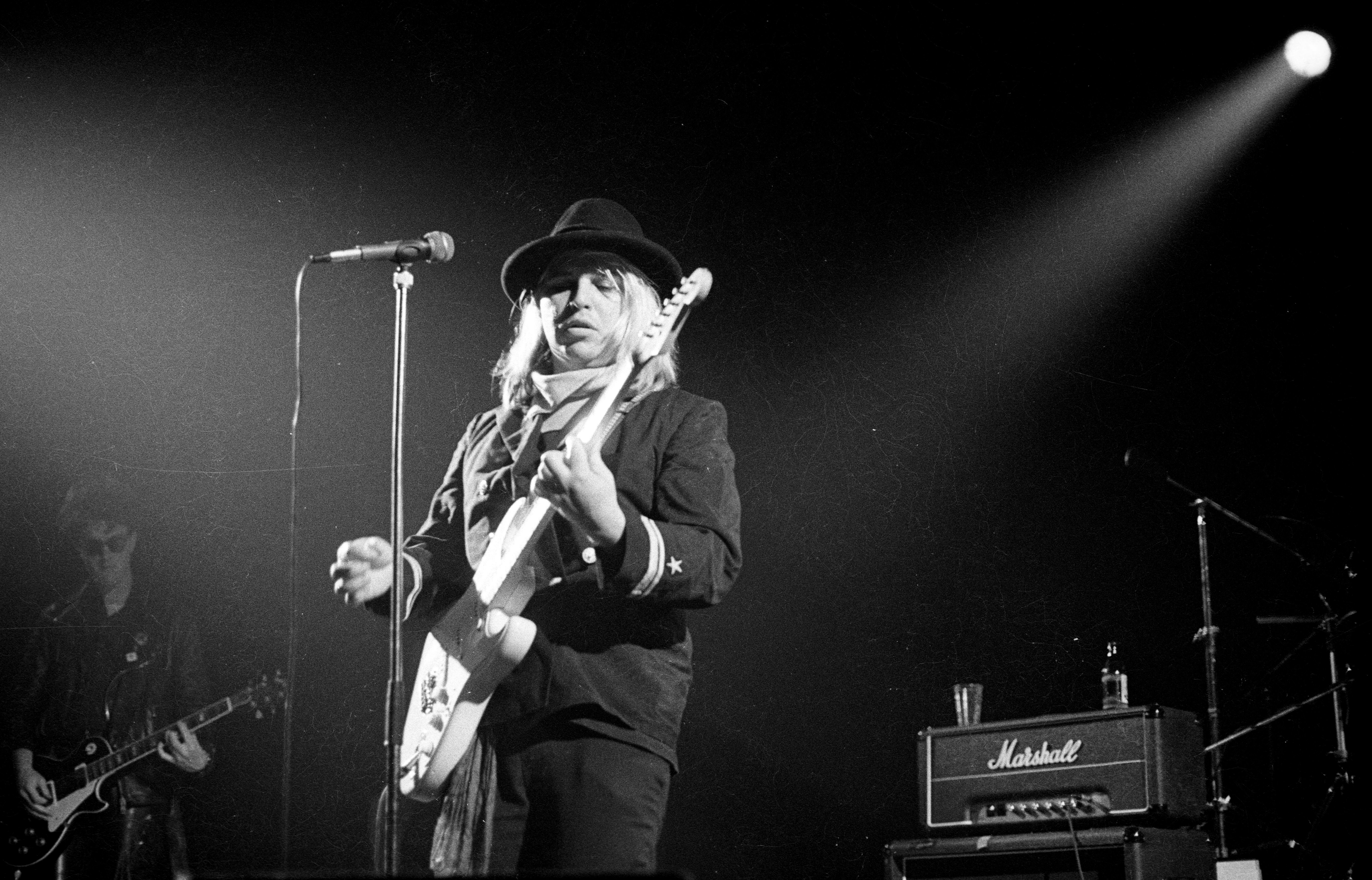 Hof ter Lo - Antwerp - Belgium - 1985